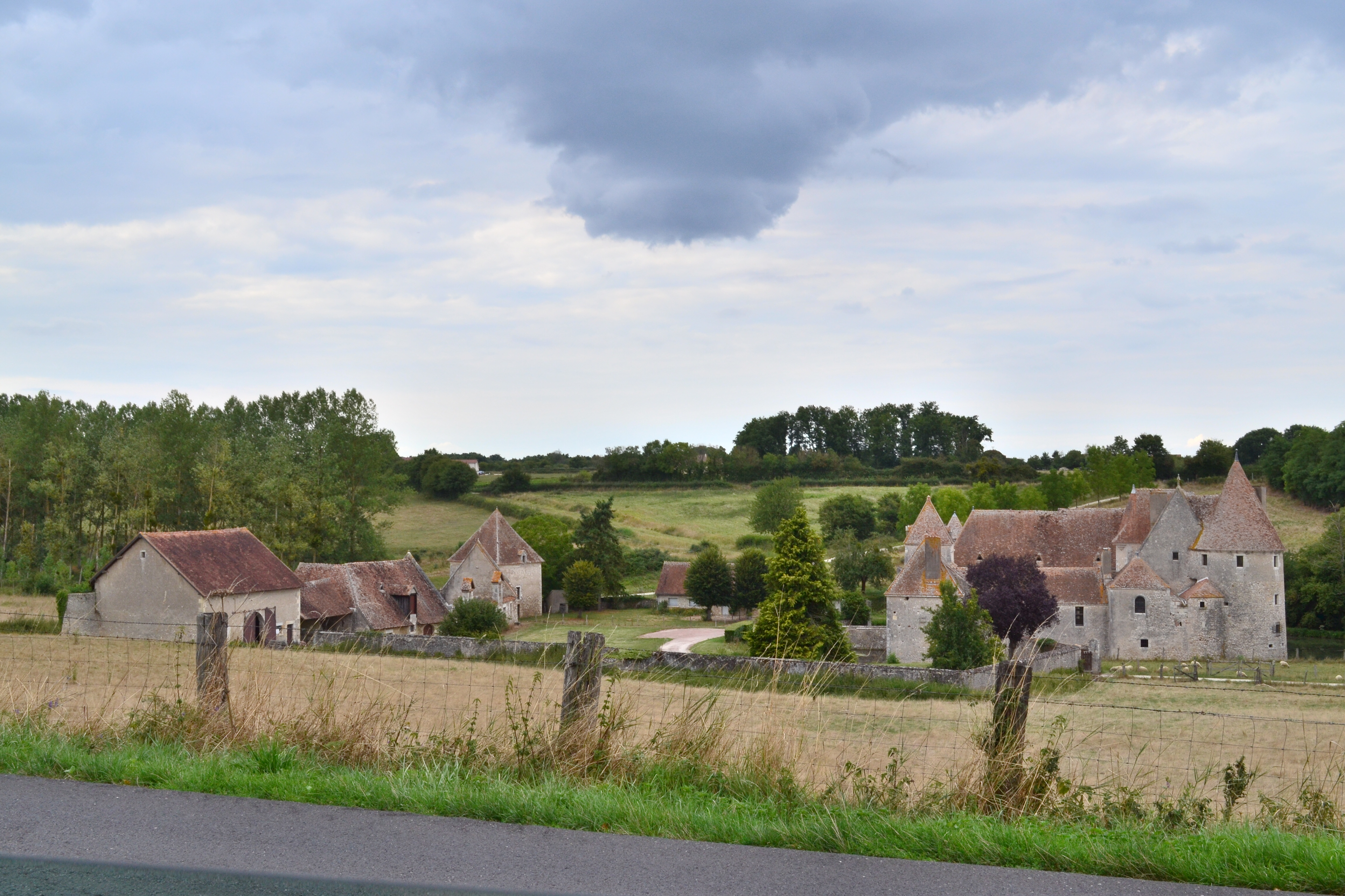 Vue d'ensemble du Château de Buranlure.